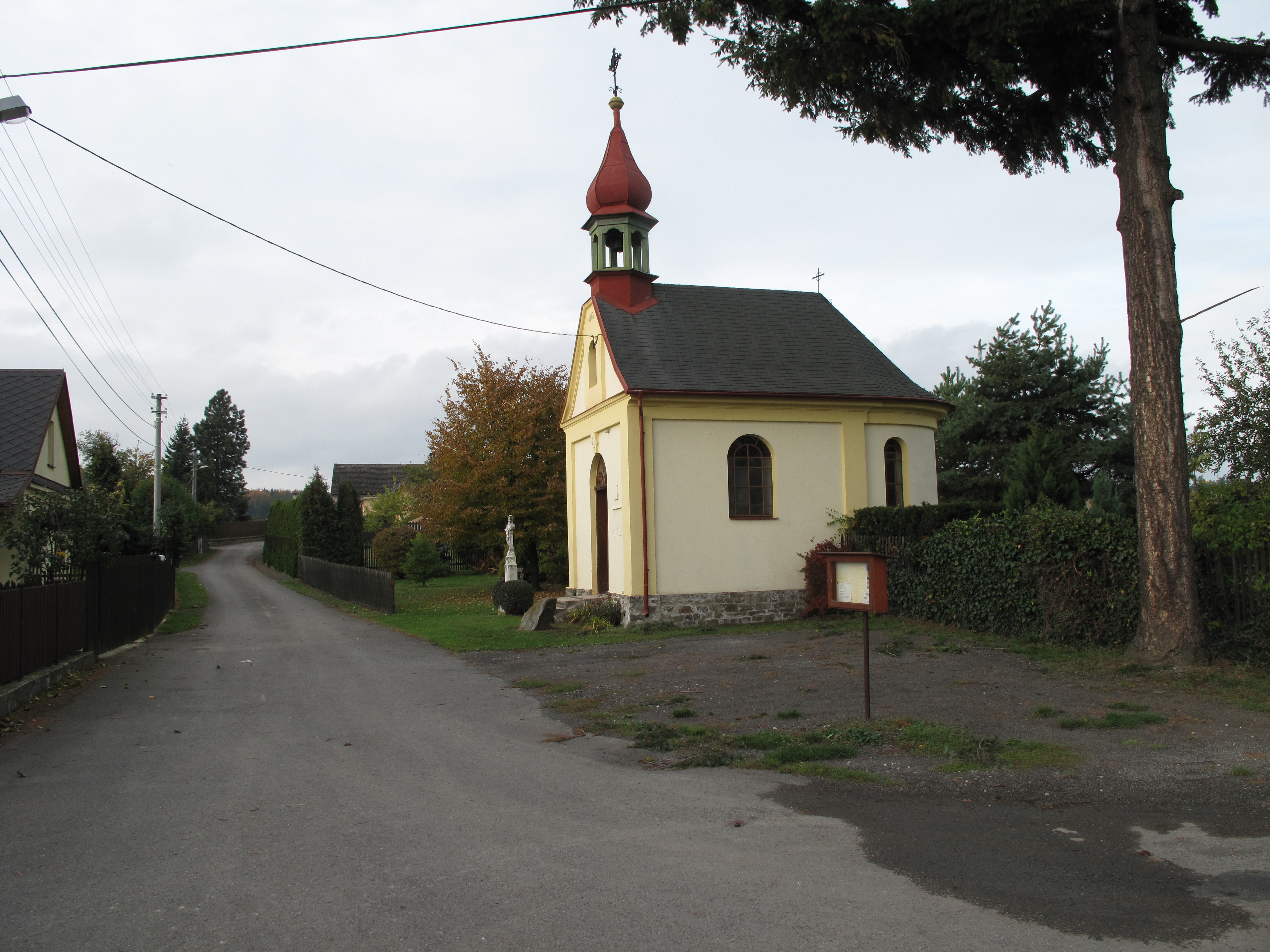 Vendelín (Štáblovice). Okres Opava, Česká republika.